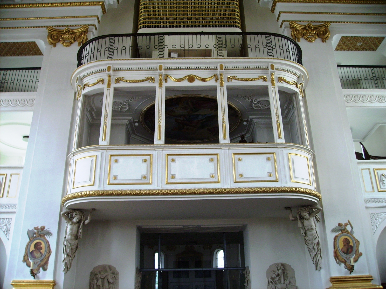 Hechingen, Germany